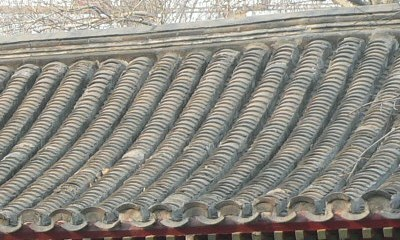 仰合瓦 拍摄